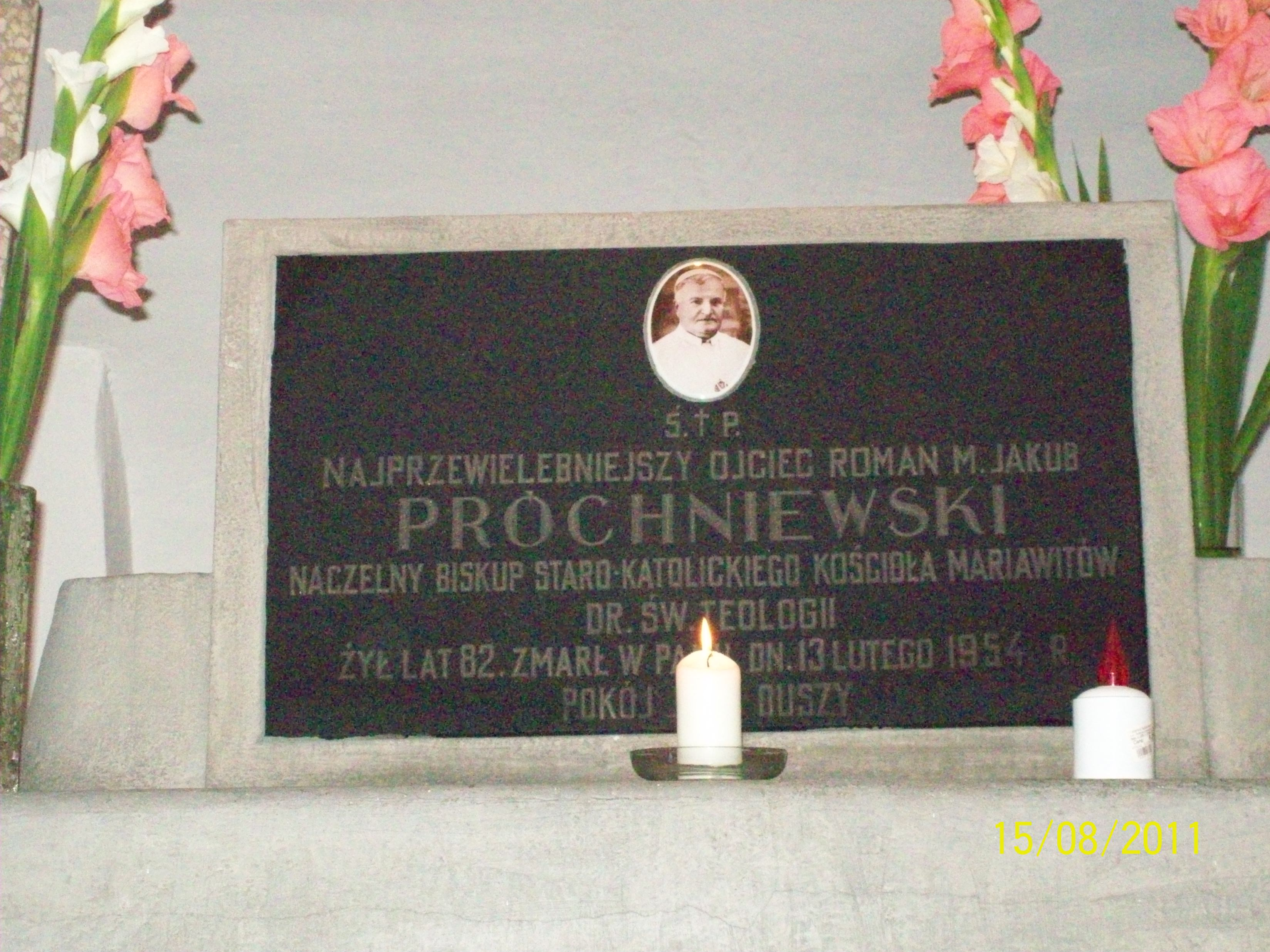 Tablica nagrobna Biskupa Romana Marii Jakuba Próchniewskiego w krypcie św. Franciszka w Świątyni Miłosierdzia i Miłości w Płocku